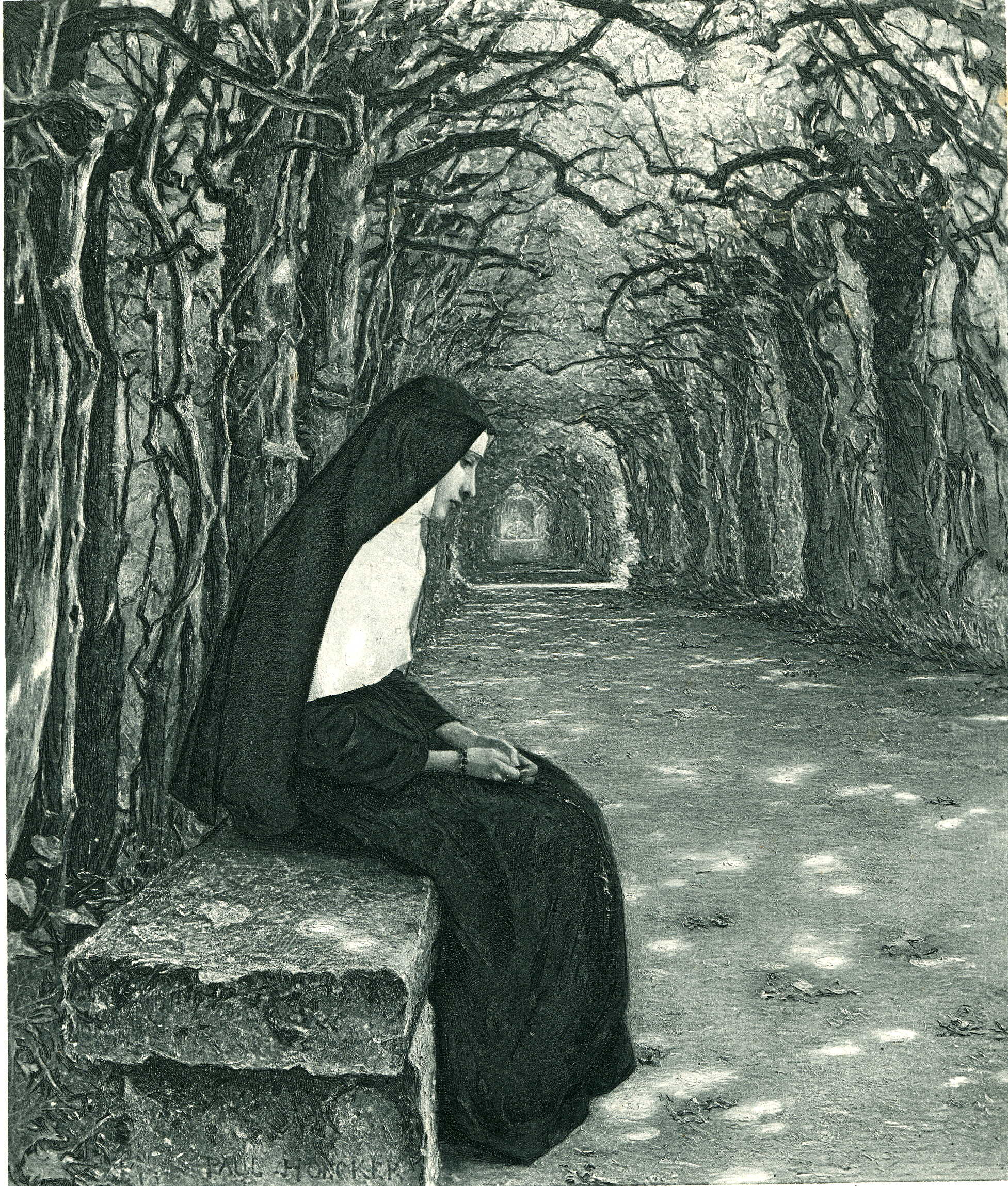 Paul Hoecker-Nonne im Laubgang von Dachau